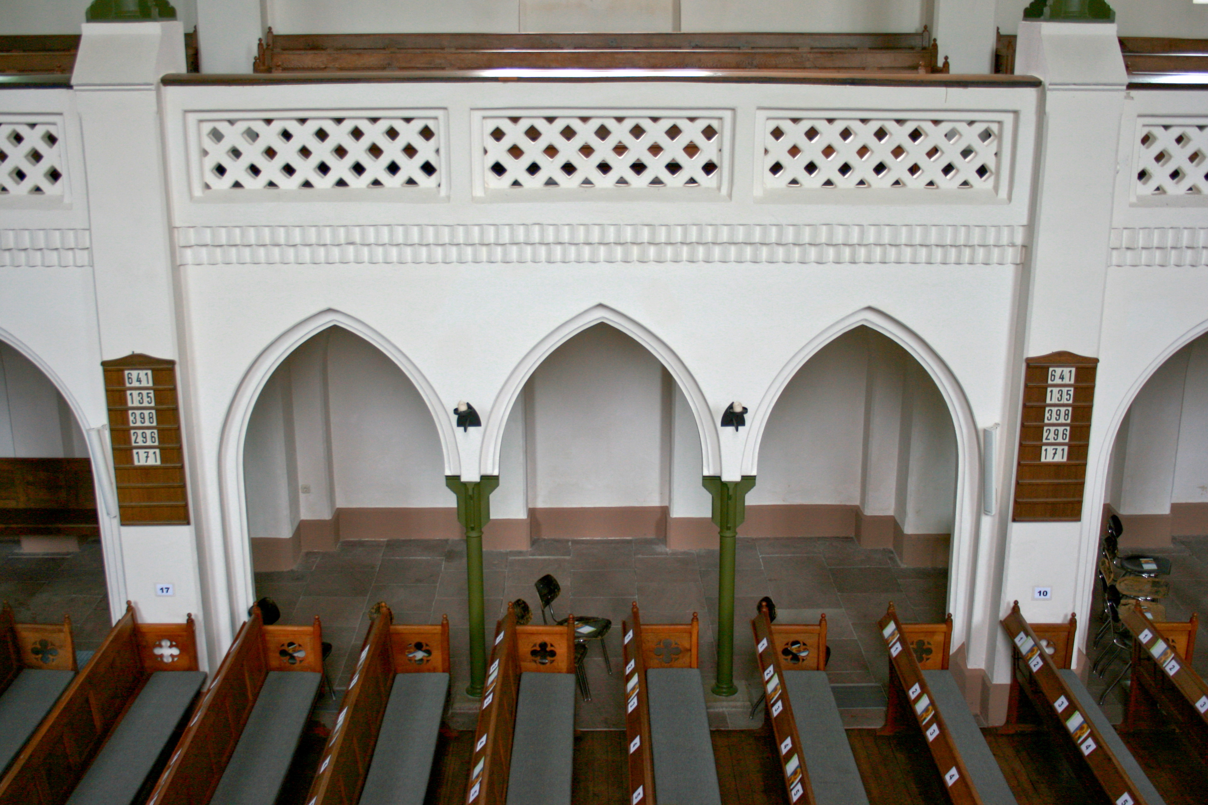 Evangelische Stadtkirche in Rotenburg (Wümme)